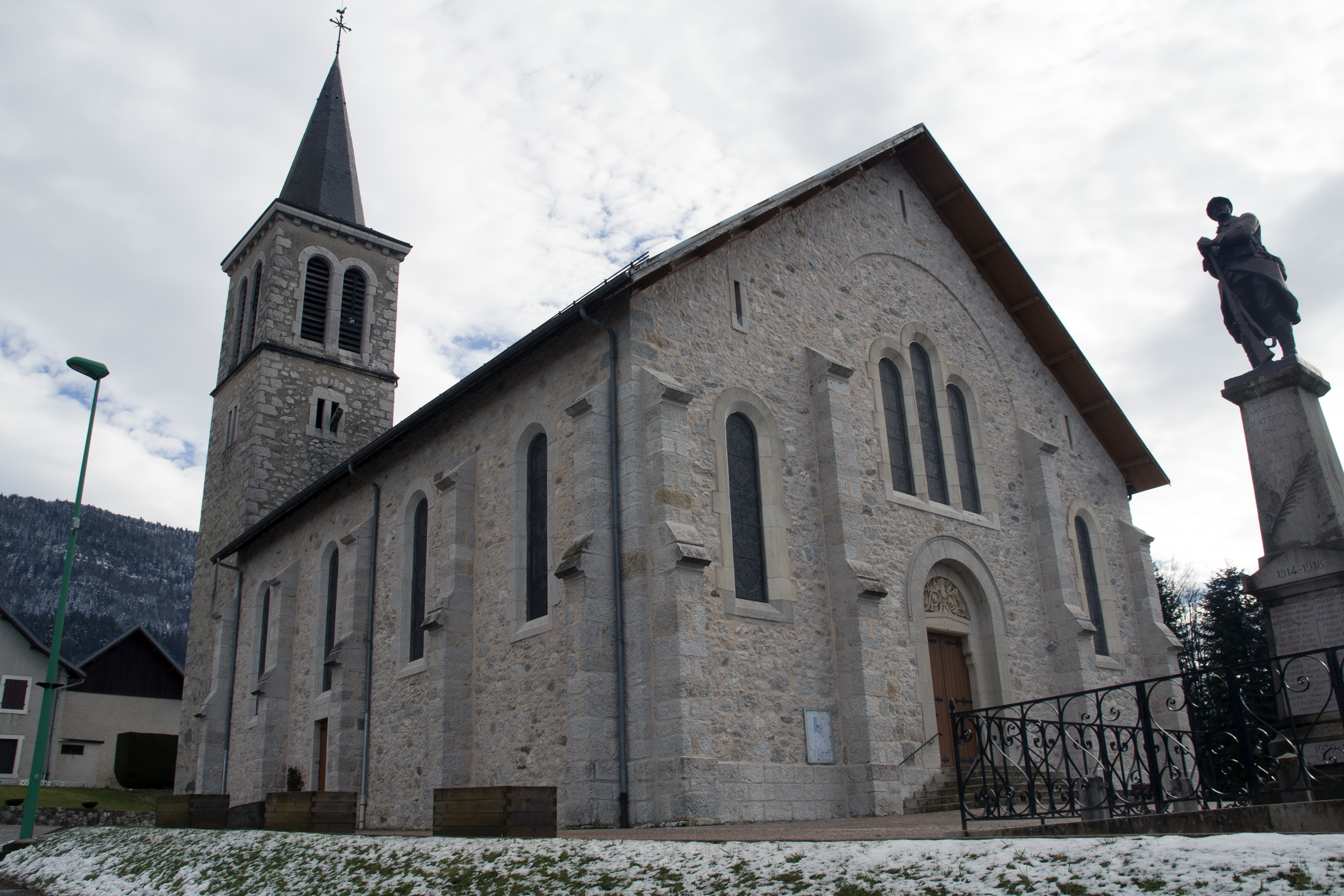 Église d'Attignat-Oncin (73610)